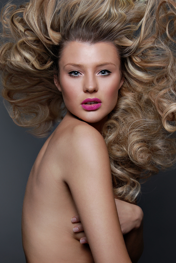 Ksusha Belousova